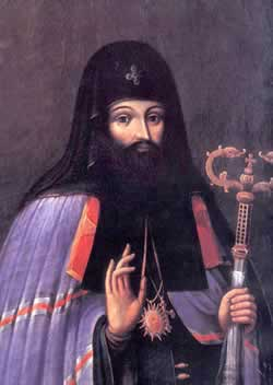 Mohyla Petro, Могила Петро Симеонович, Petru Movilă